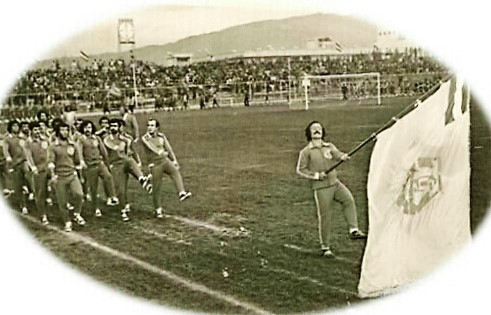 بازیکنان باشگاه ماشین سازی در حال رژه رفتن در ورزشگاه باغشمال در سال 1348.